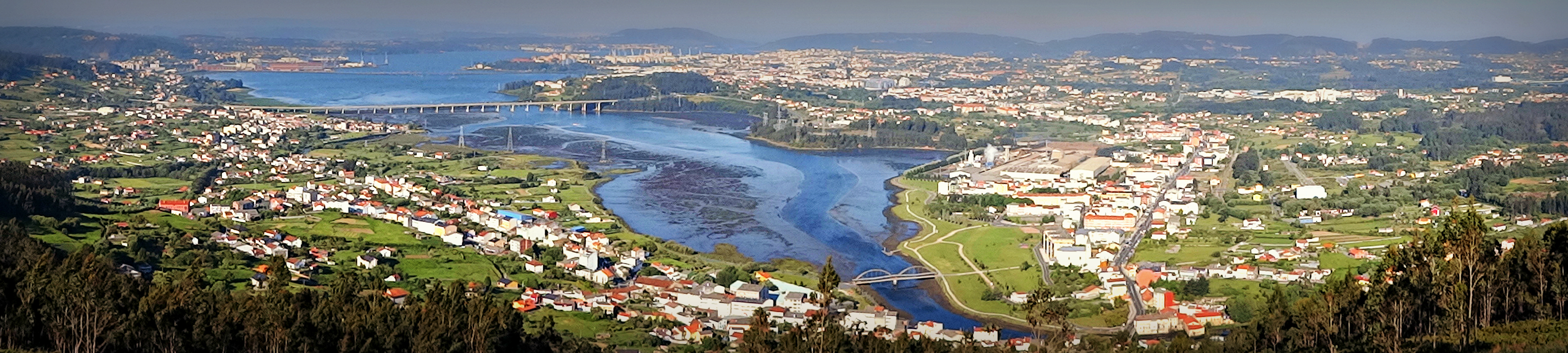 Ferrolterra desde Monte de Ancos